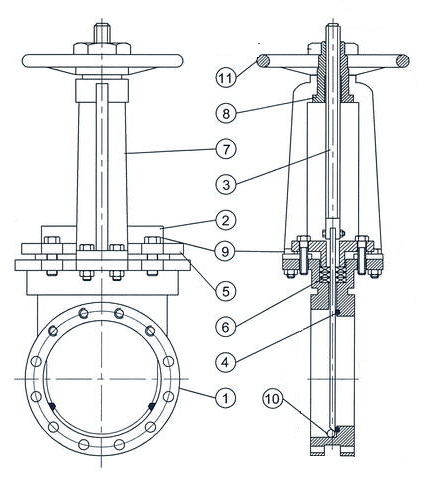 1- Sklendės korpusas, 2 – Metalinė plokštė ( peilis) , 3 – Velenas, 4 – Sandarinimo žiedas, 5 – Tarpinė; 6- Tarpinės žiedas; 7- Pagalbinė plokštė 8 – Viršutinė atrama; 9 – Kaištis; 10 – Apatinė atrama; 11 – Valdymo ratas.